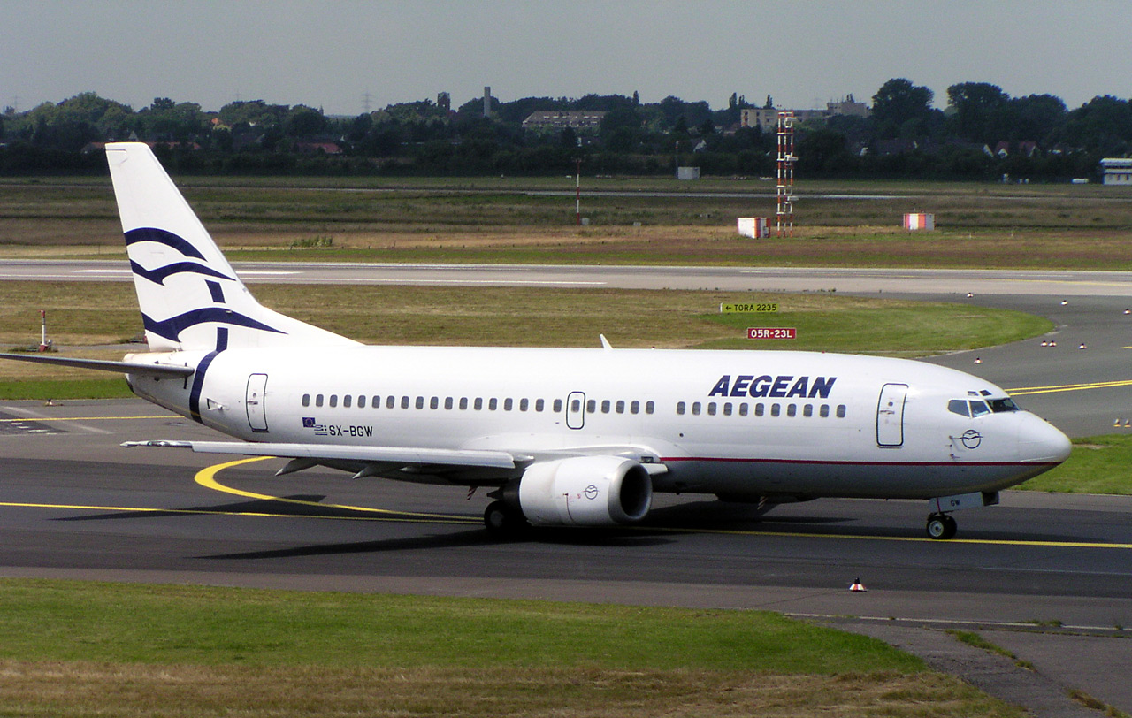 Boeing 737-300 de Aegean Airlines Description: Aegean Airlines Boeing 737-300 in Düsseldorf, 2004-07-06 Photographer: Arcturus Licence: GFDL-self + cc-by-sa-2.0-de